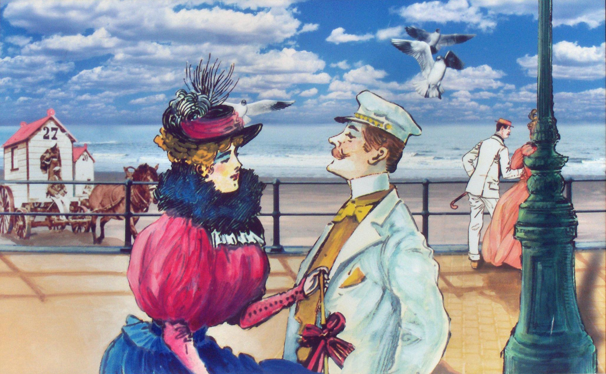 "Oostende anno 1900" Project "Van Koning tot Koningin" - trompe l'oeil Victorialaan, Oosteroever, Oostende, België 2006 1000 x 3500